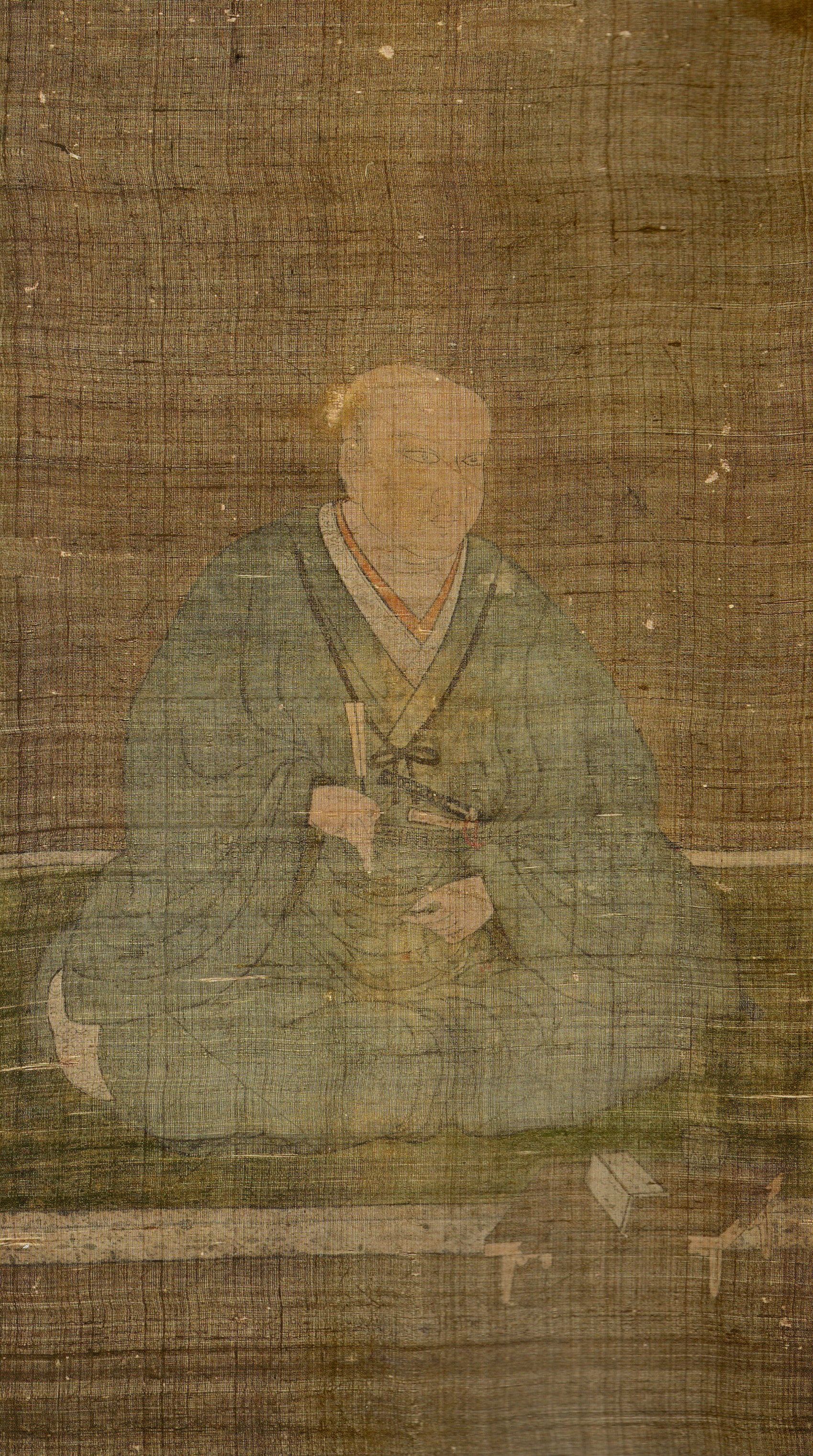 芳賀高名の肖像画。